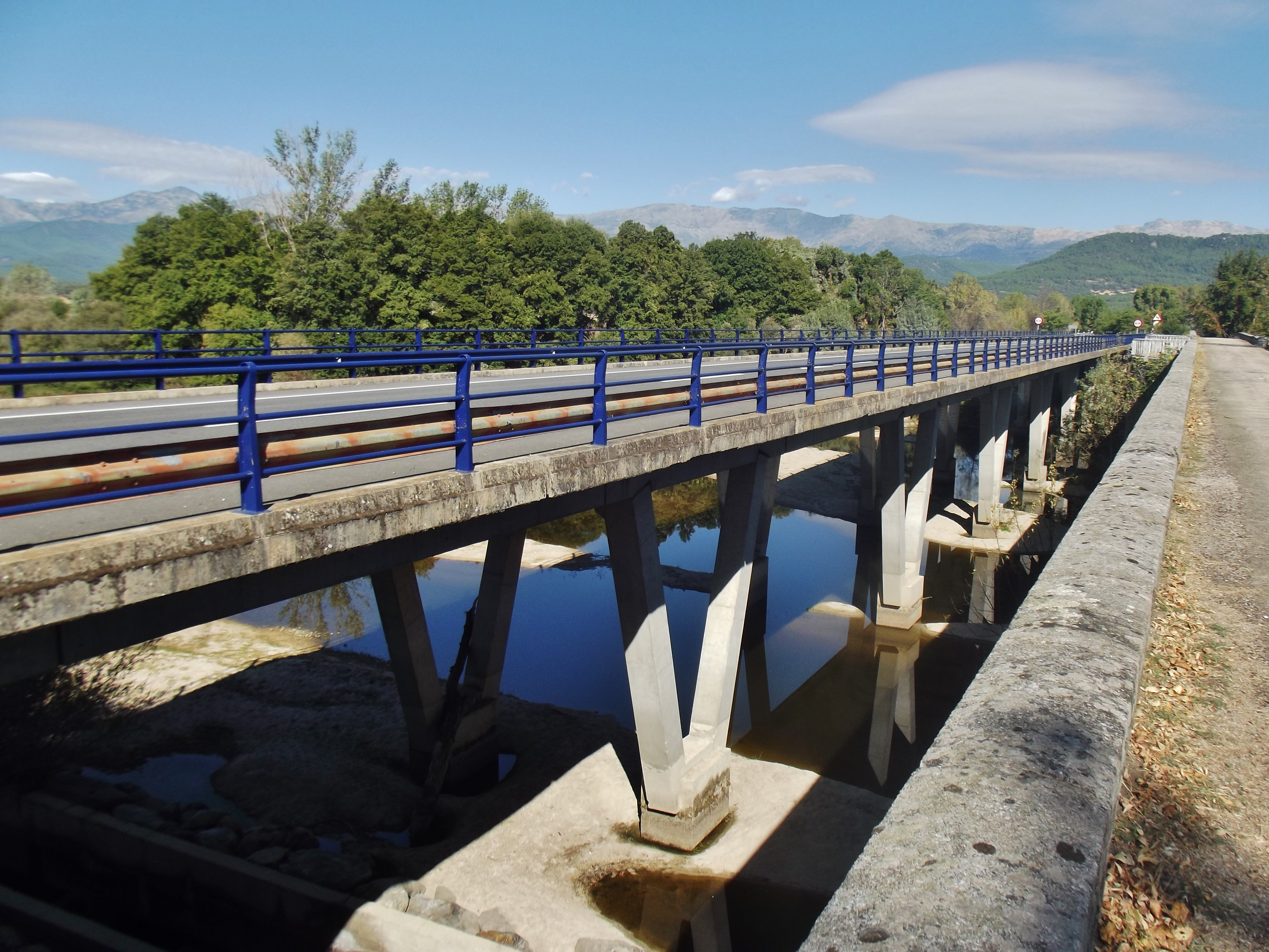 Viaducto de la N-502 desde el puente viejo sobre el Tiétar